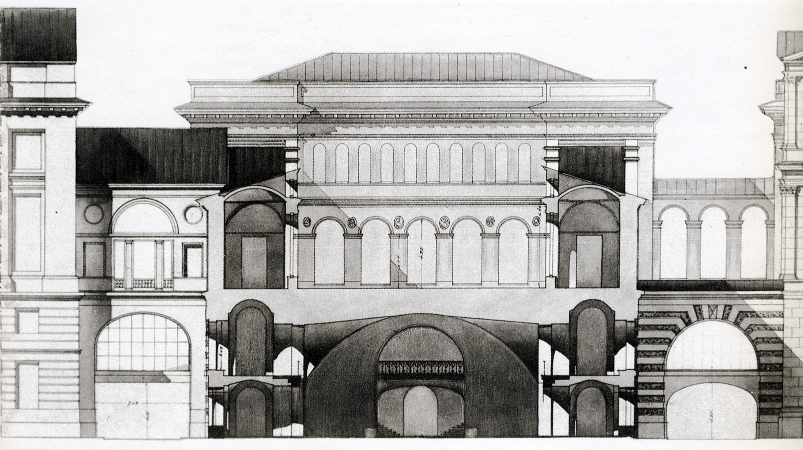 Проект переустройства Манежа и конюшен в здании Малого Эрмитажа. А. В. Сивков, 1940 г.